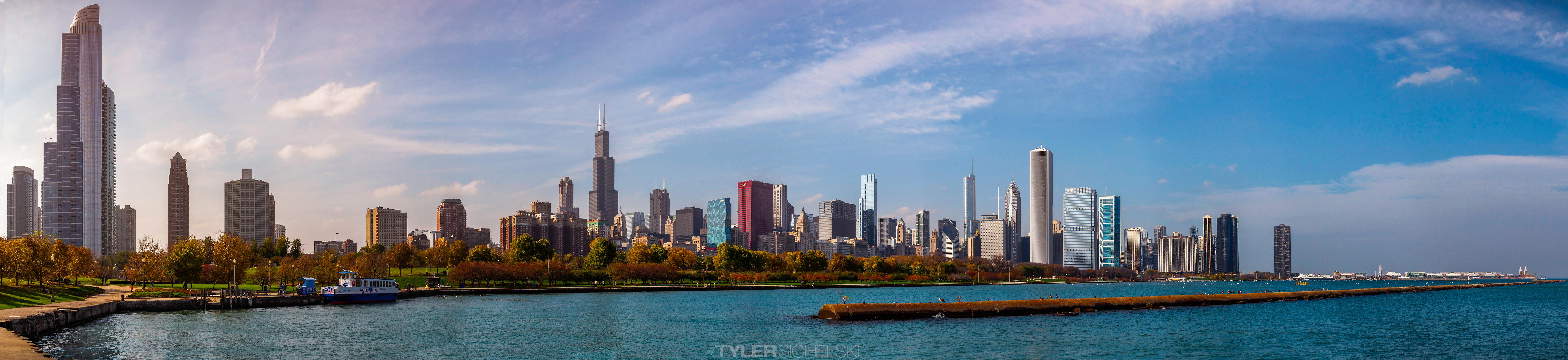 Facebook | 500px | Store